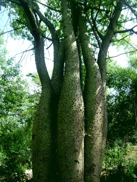 Palo borracho múltiple en Olta, La Rioja